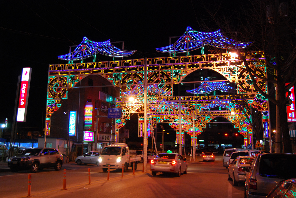 Taebaek Winter Festival